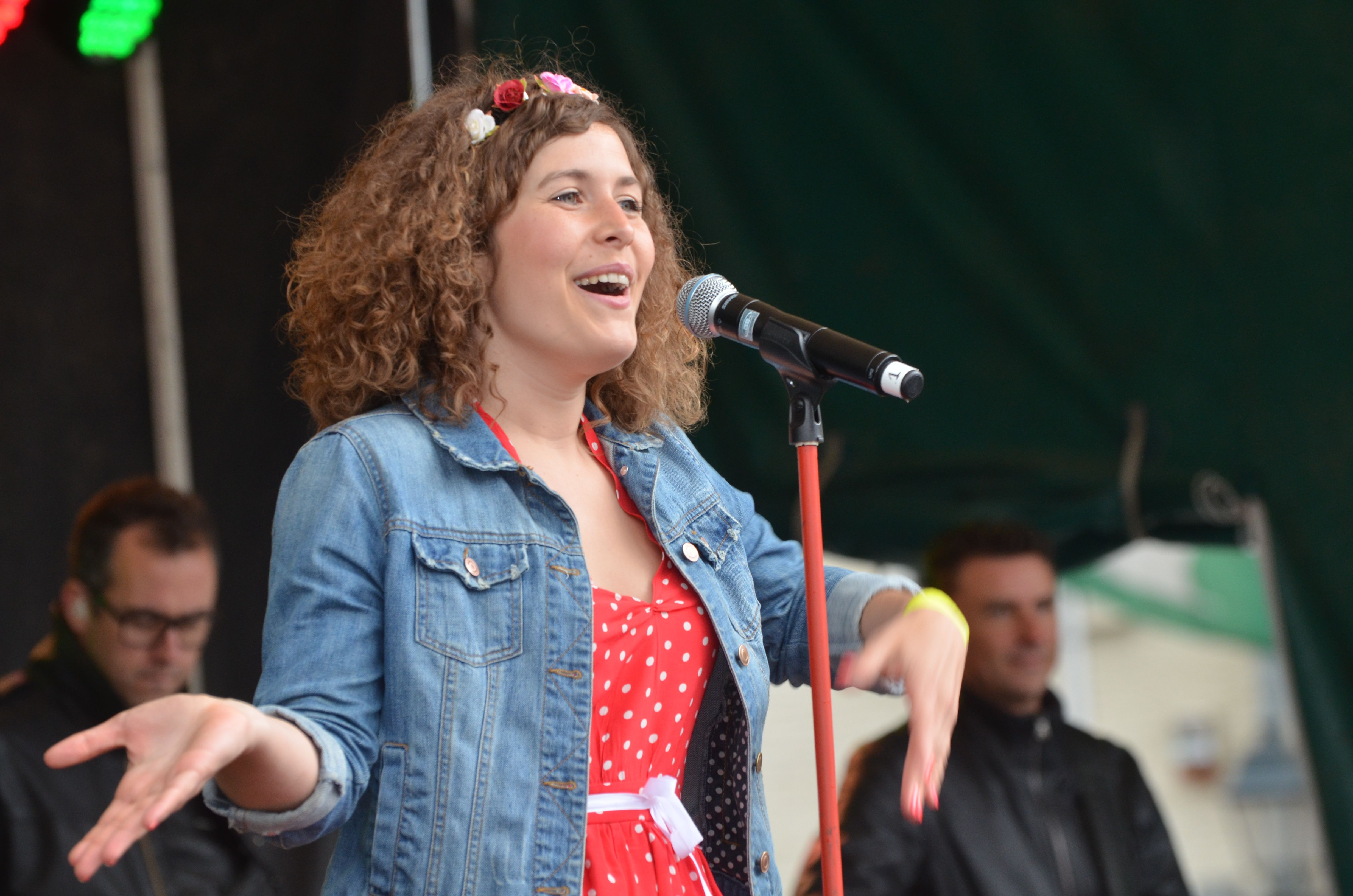 Maureen Vanherberghen van de Ketnetband tijdens een optreden voor Mechelen Kinderstad.